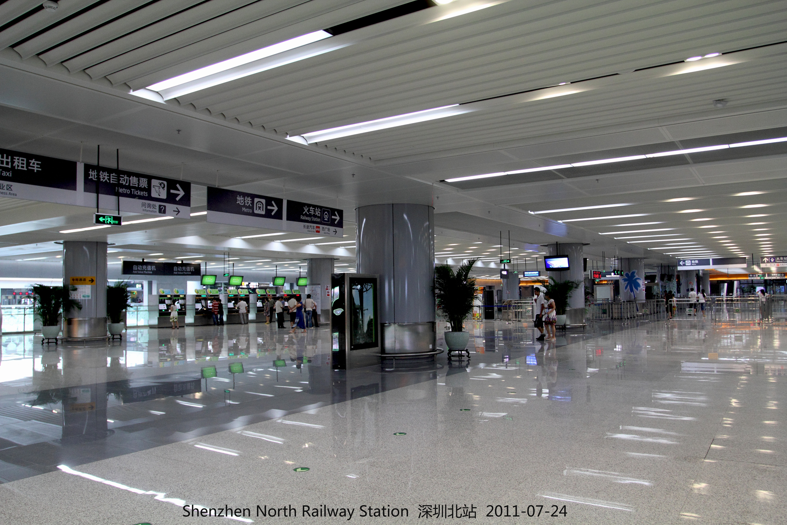 深圳北站 shen zhen bei zhan